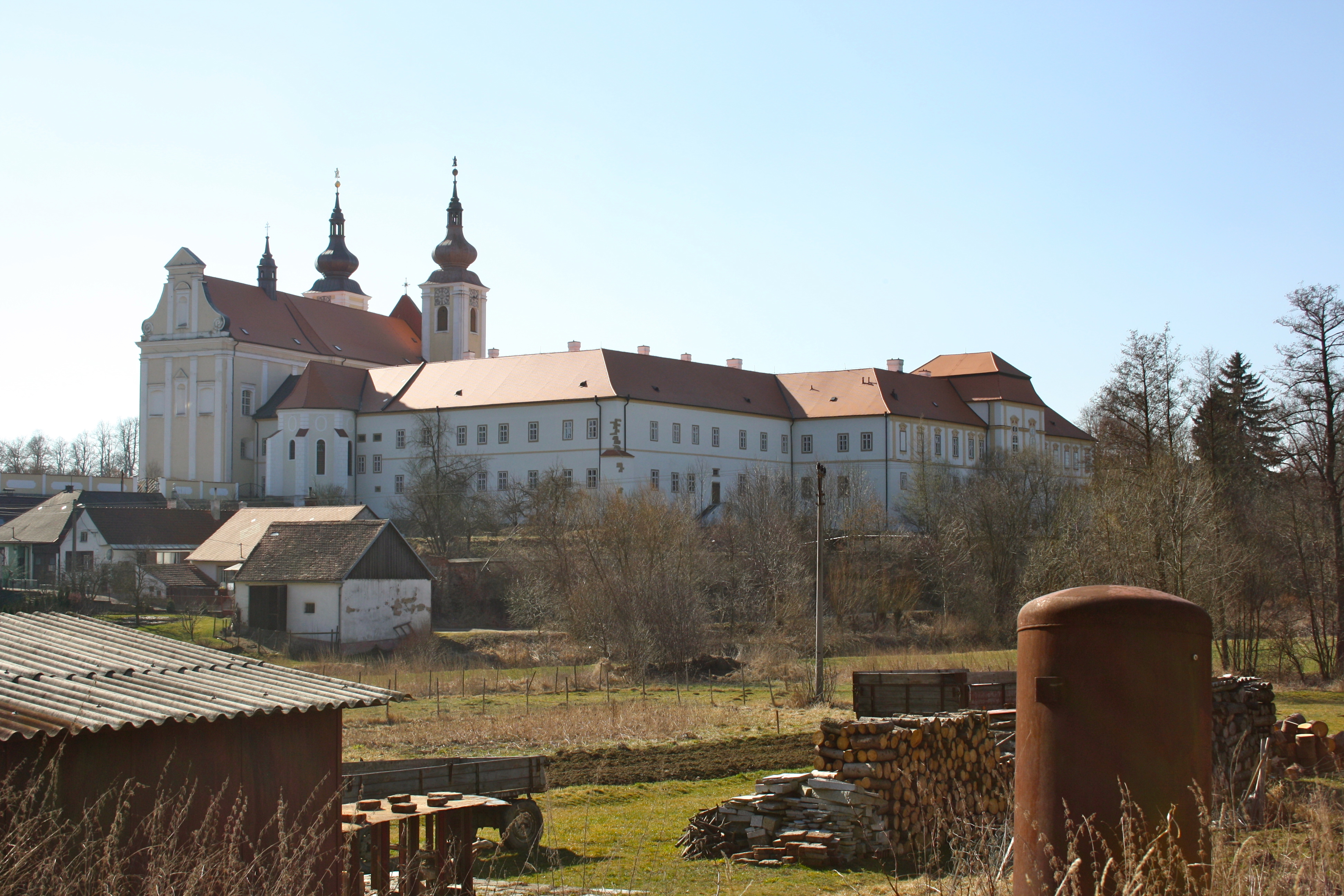 Klášter premonstrátský (Nová Říše), Nová Říše 1